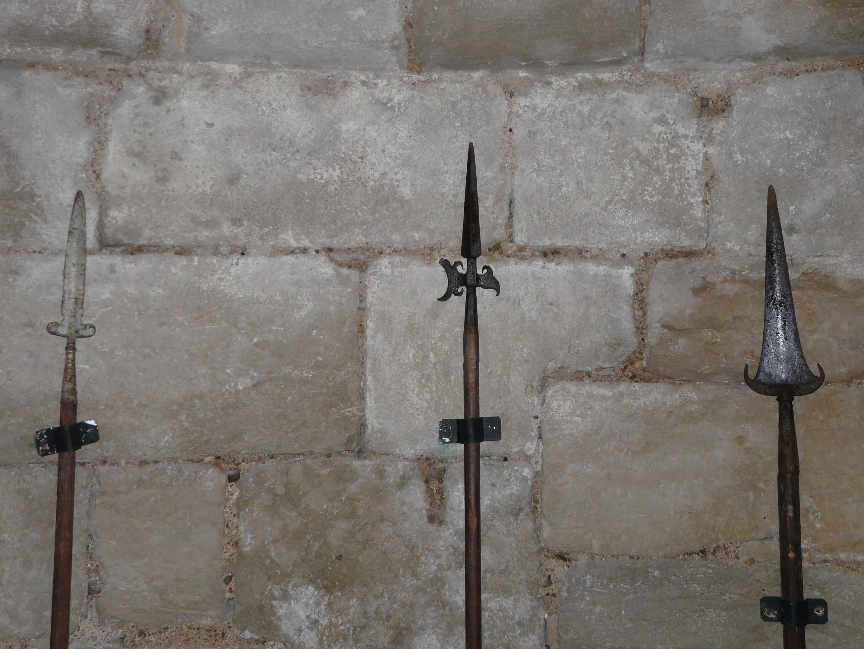 Une hallebarde entre deux pertuisanes, salle des gardes de la tour Mataguerre, Périgueux, Dordogne, France.